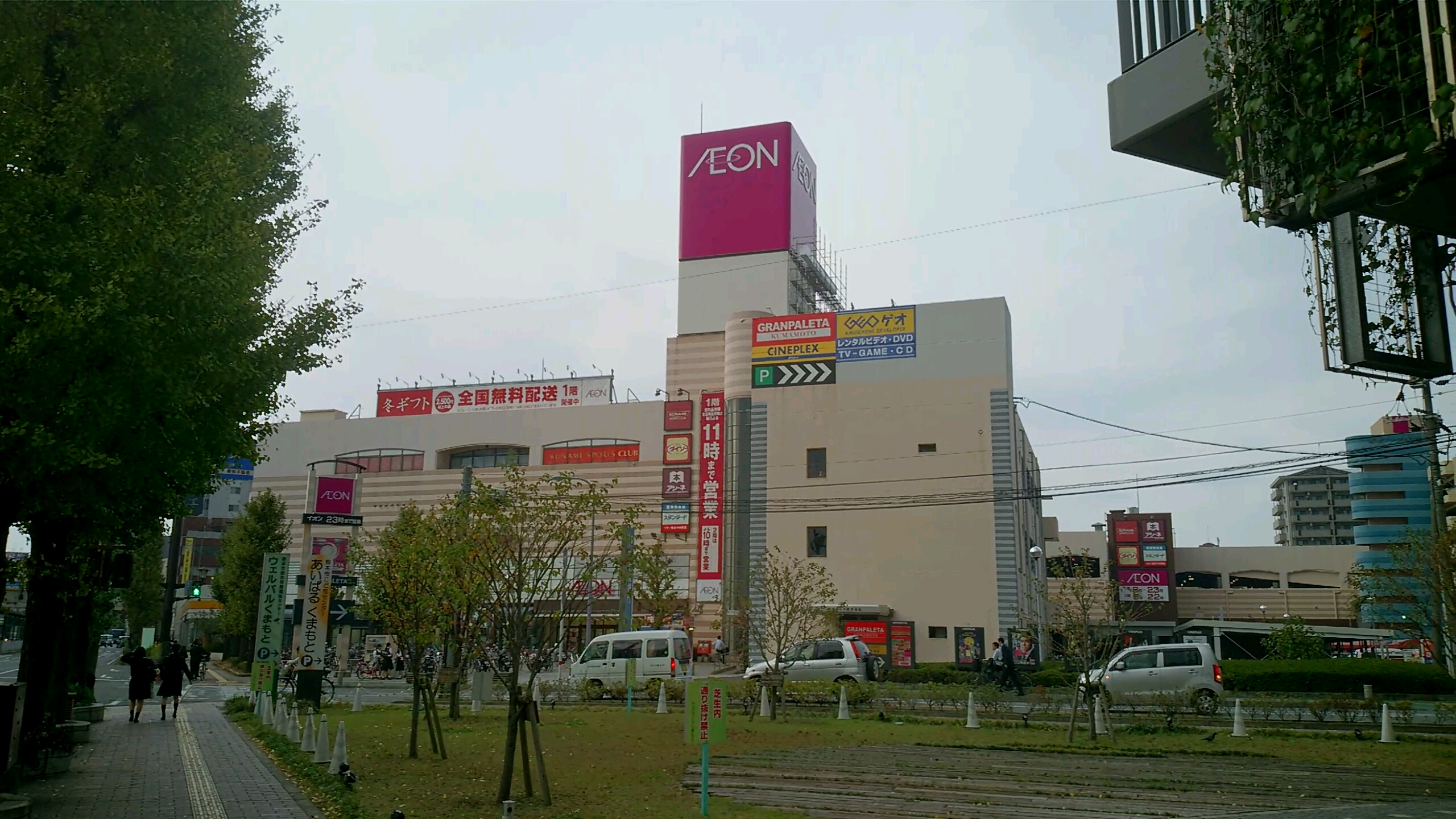 イオン熊本中央店(旧ダイエー熊本店)